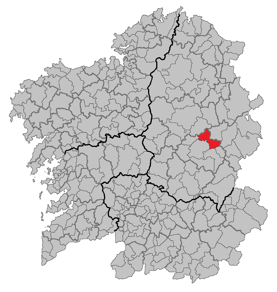 Mapa coa localización do concello de Láncara.